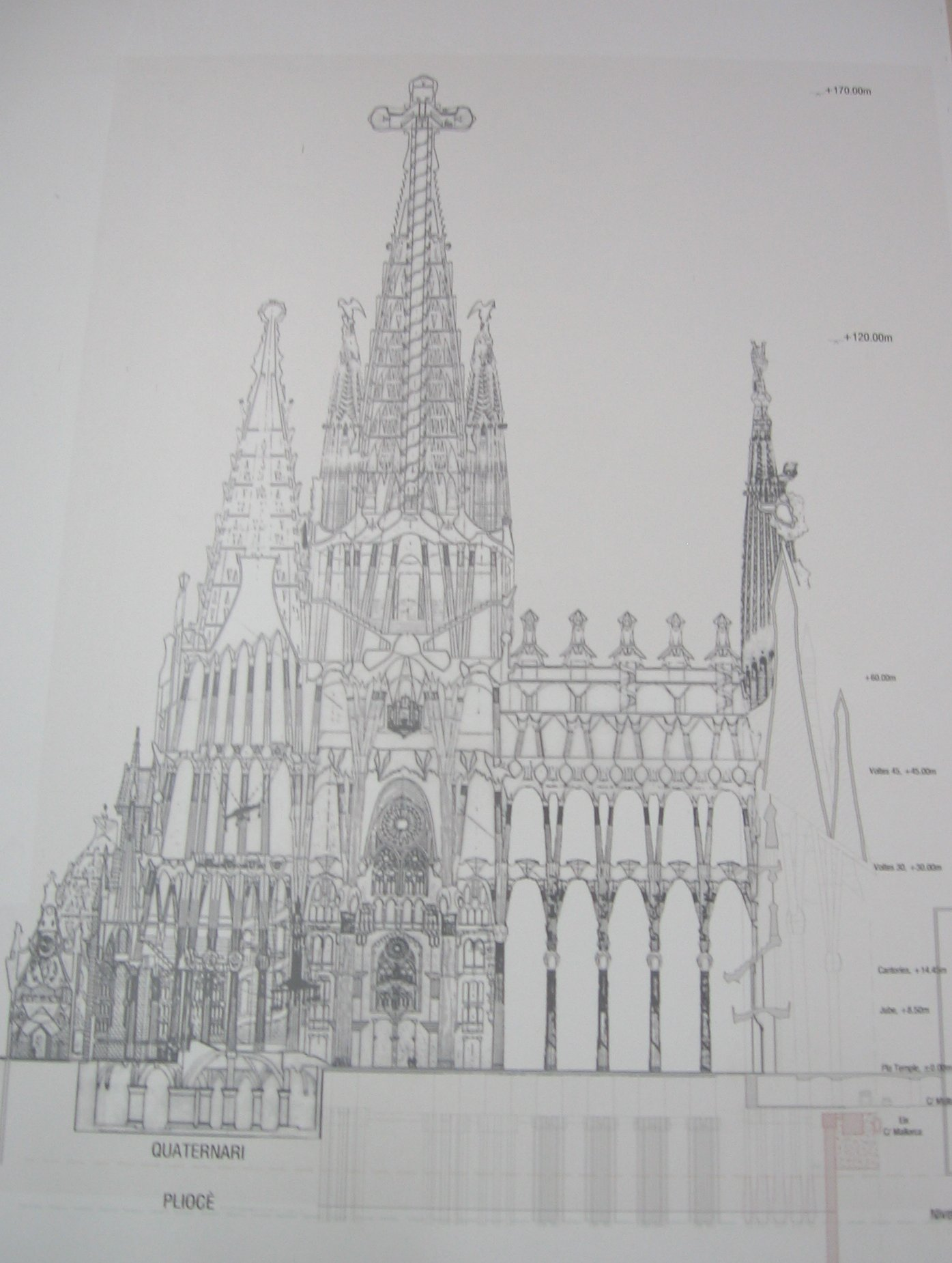 Sección transversal de la Sagrada Familia (Gaudí)